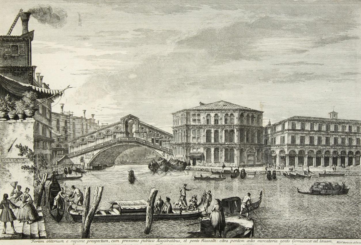 Venezia, Ponte di Rialto